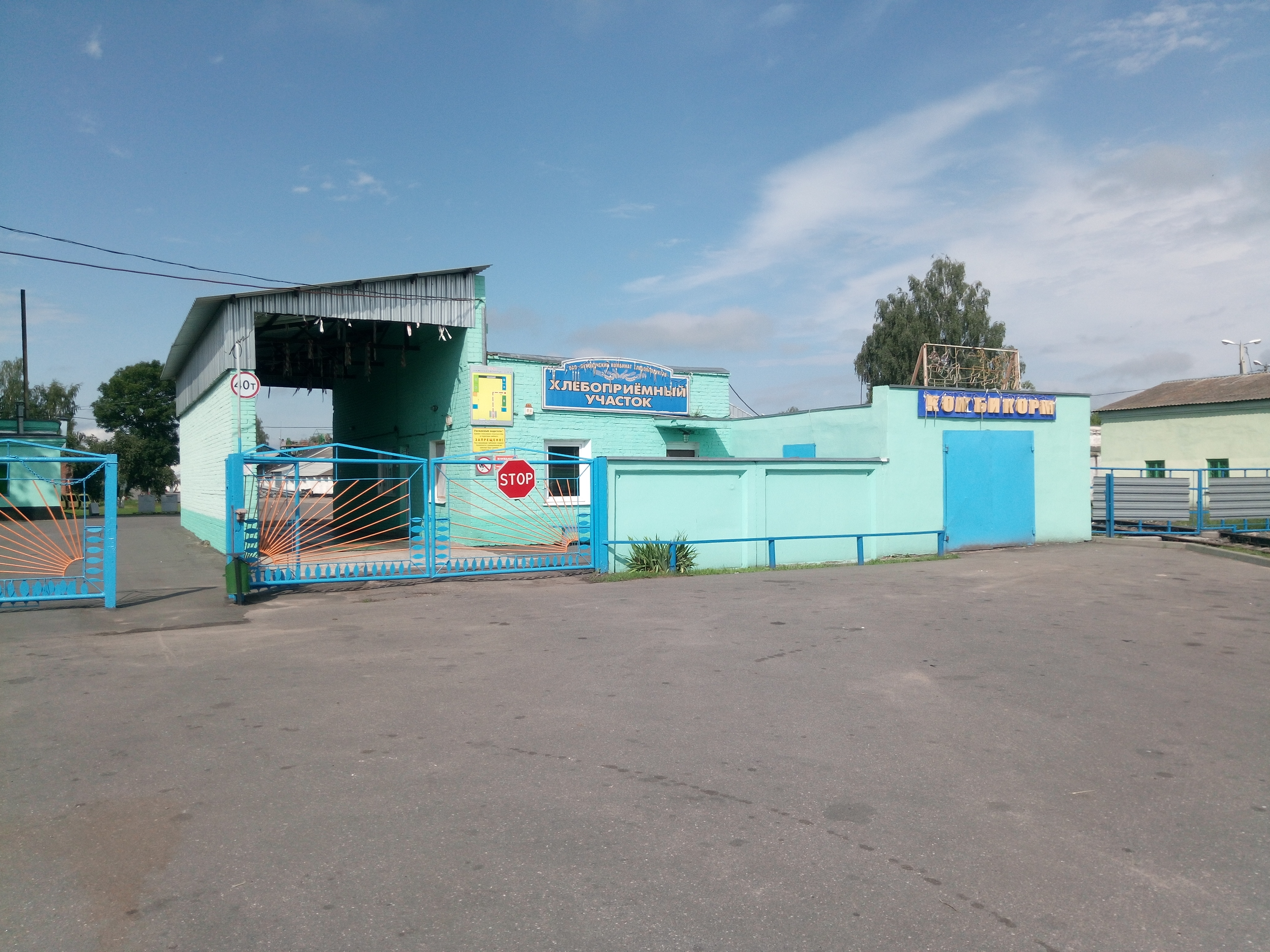 ААТ «Пухавіцкі камбінат хлебапрадуктаў».